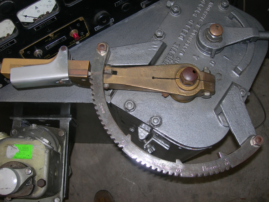 Maniglione locomotiva E636